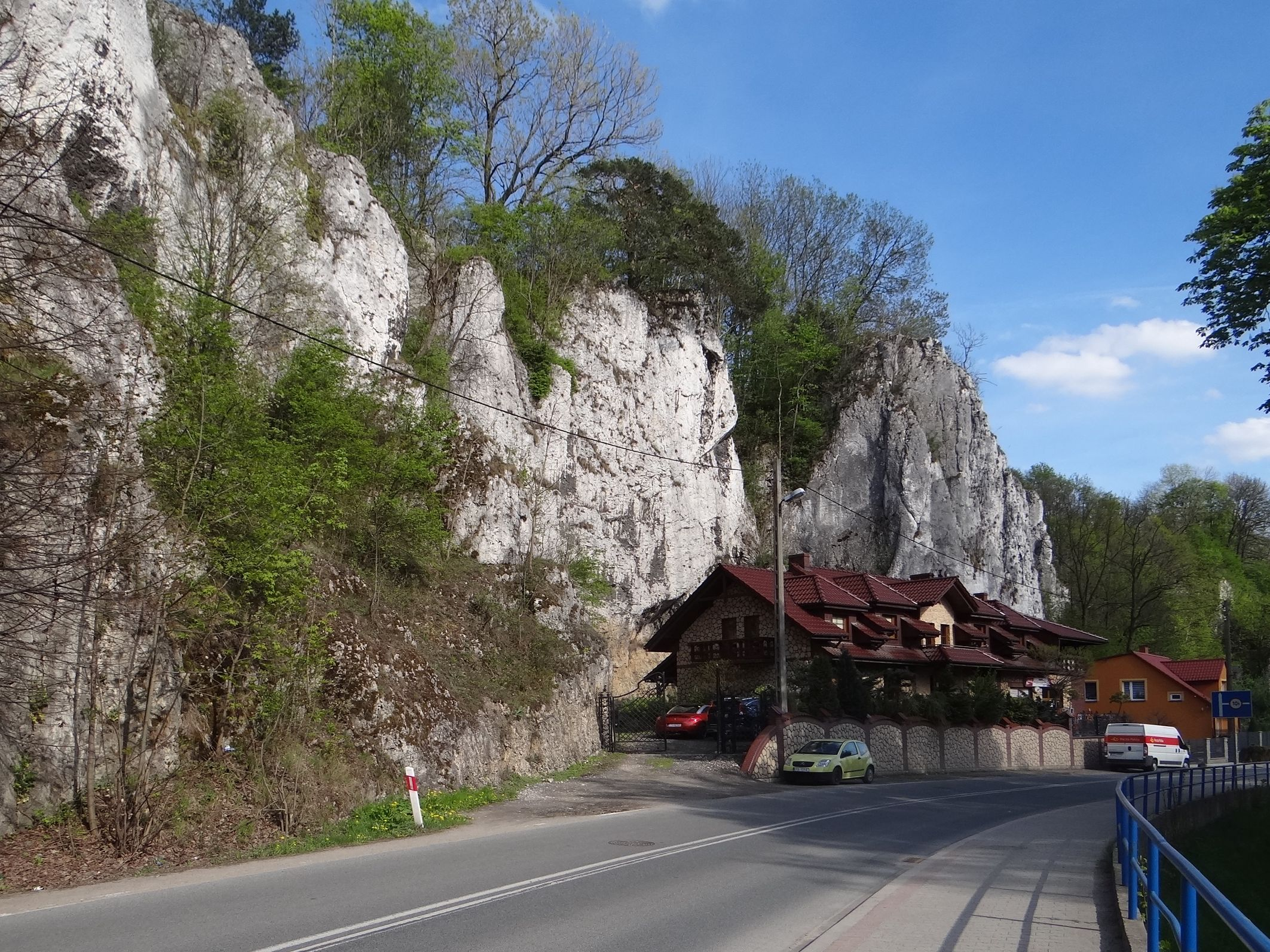 Fragment miejscowości